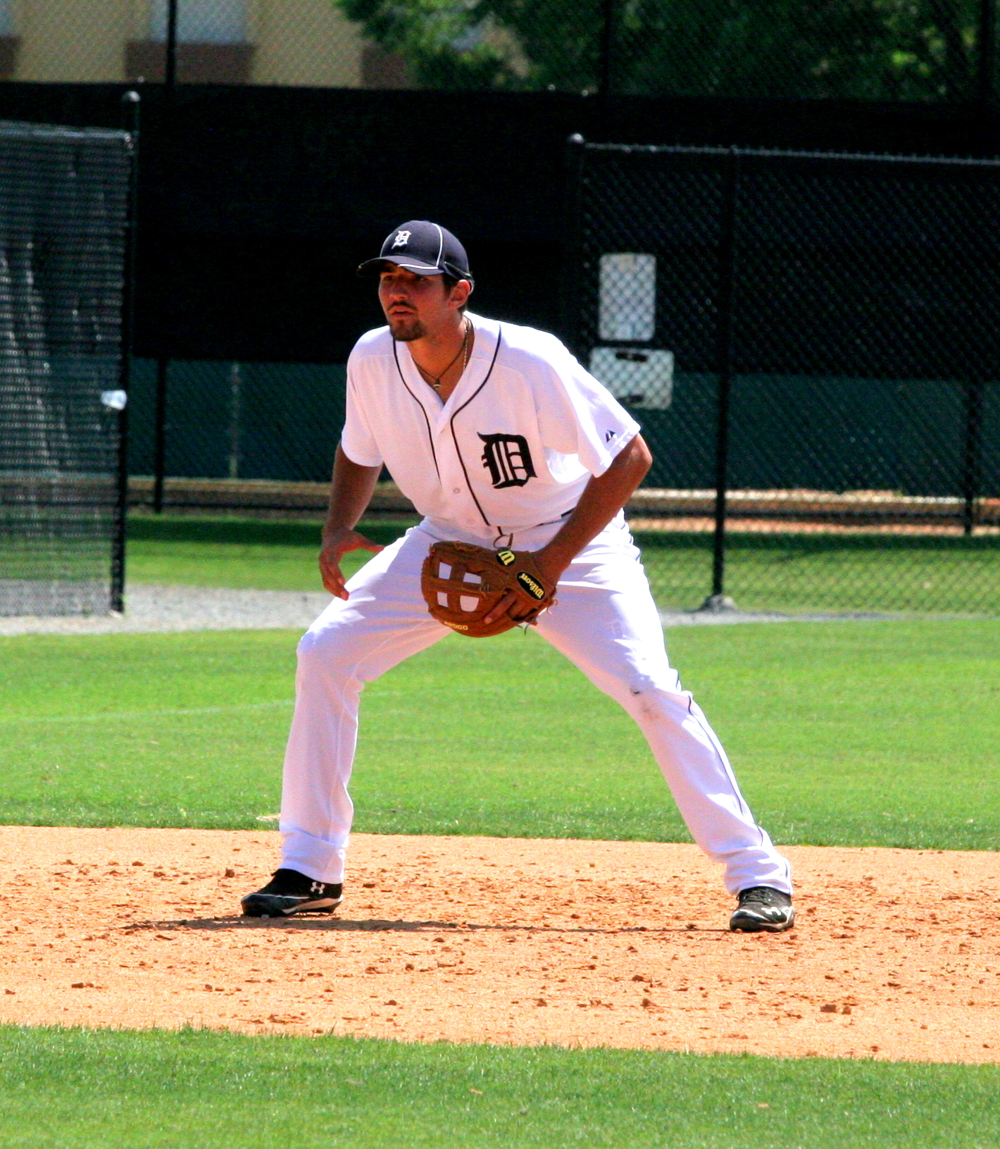 IMG_0017 Nick Castellanos